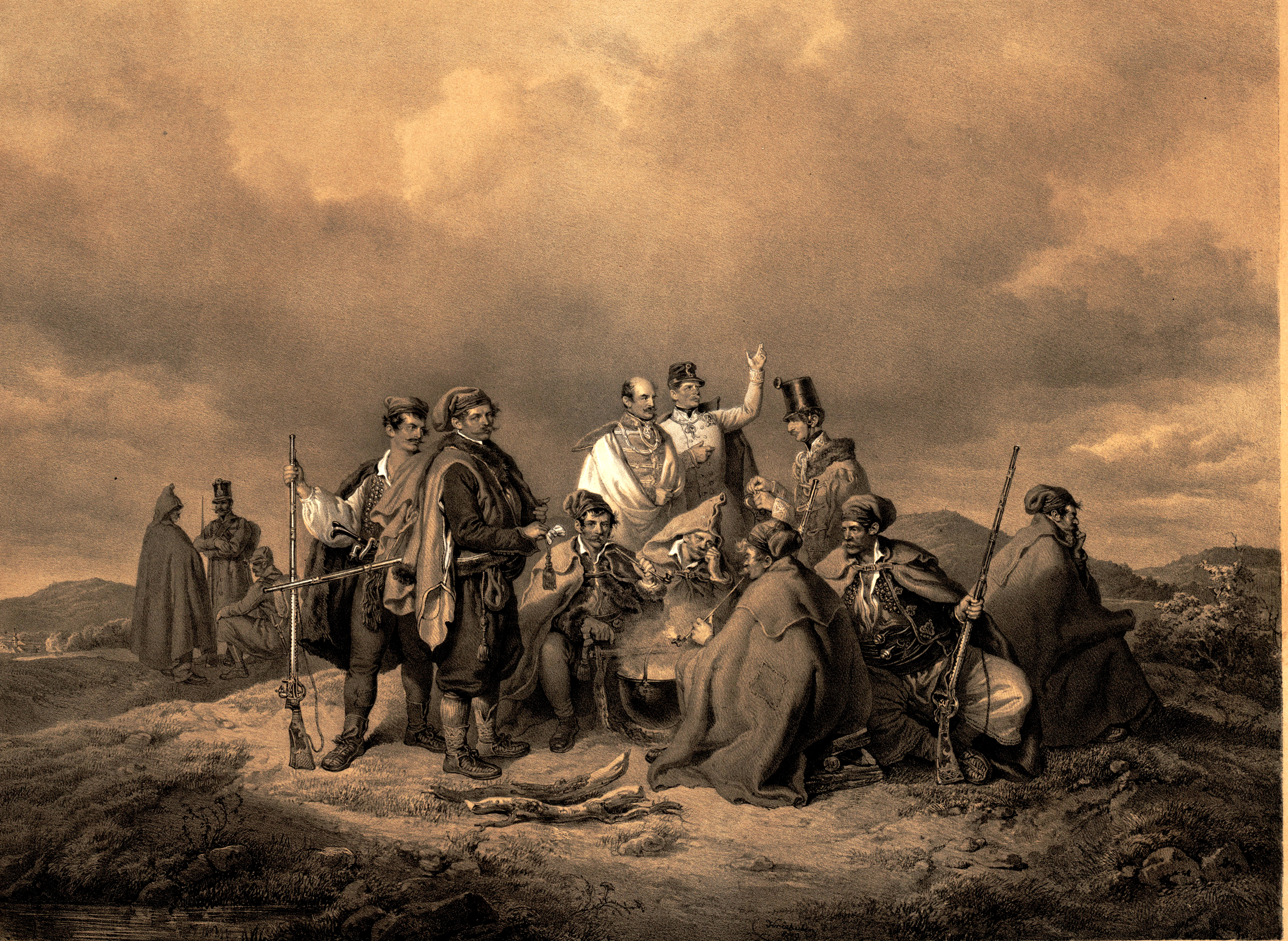 Joseph Graf Jelačić von Bužim (1801-1859) k. k. Feldzeugmeister, Ban von Kroatien, Kommandeur des Maria-Theresien Ordens, im Bivouc nach dem Gefecht bei Schwechat